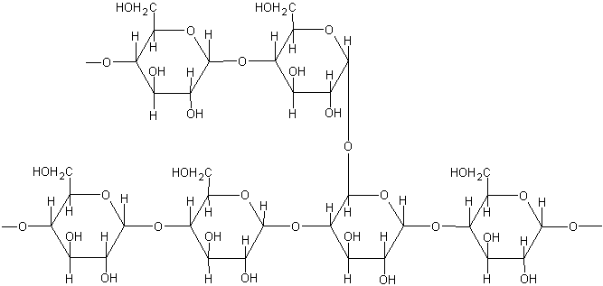 Porzione di una catena ramificata di glicogeno Tutti i legami della porzione di catena non ramificata sono α1→4 Tutti i legami della porzione ramificata sono α1→6